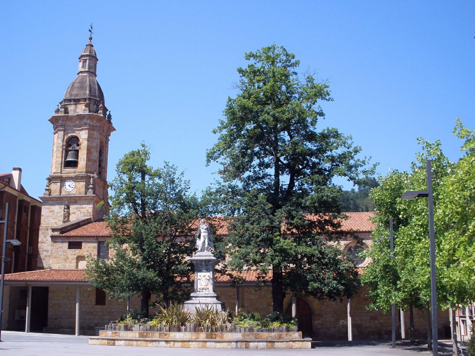 Iglesia de San Martín de Tours (Urretxu, Gipúzkoa)